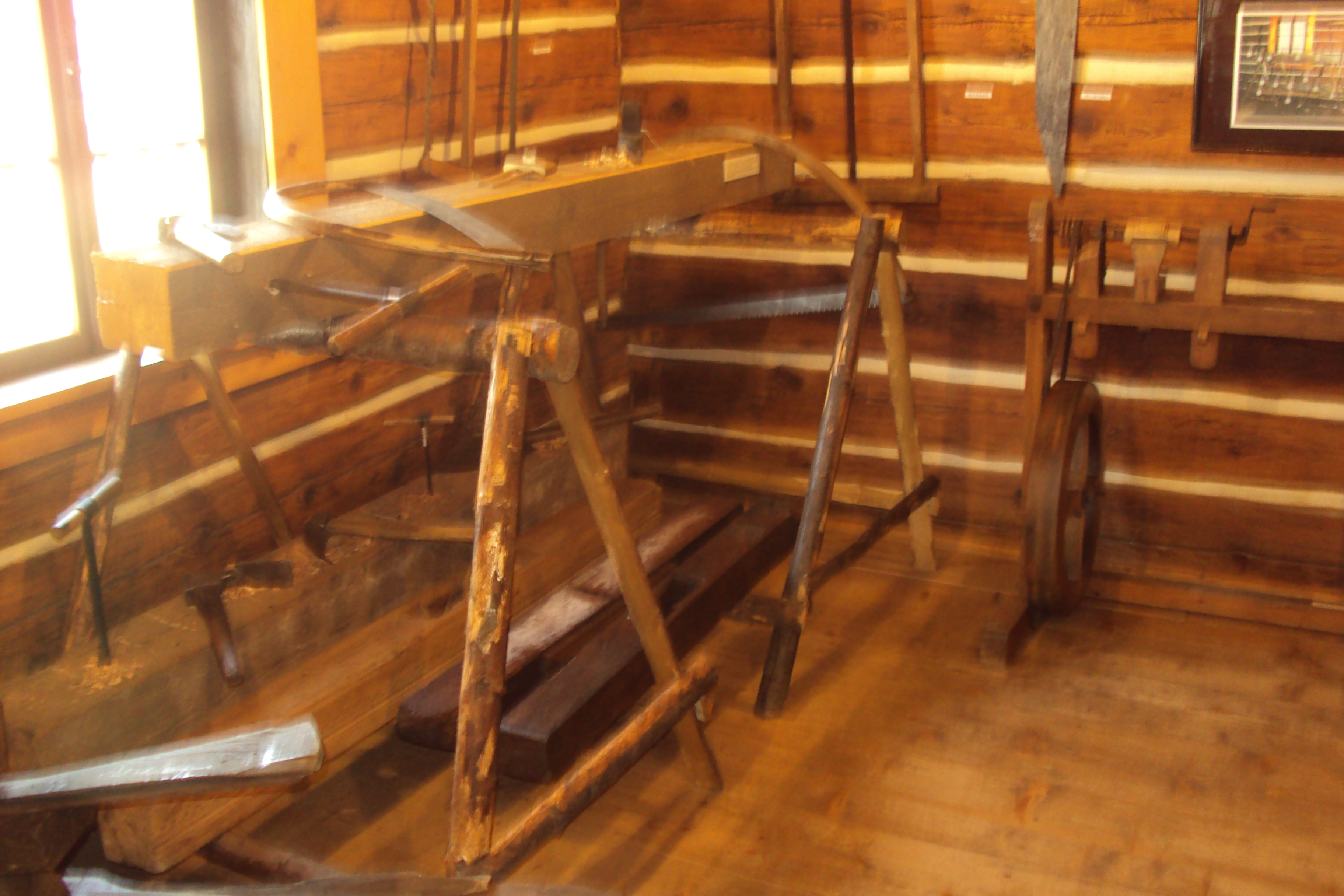 Exponáty muzea Vísecká rychta v Kravařích